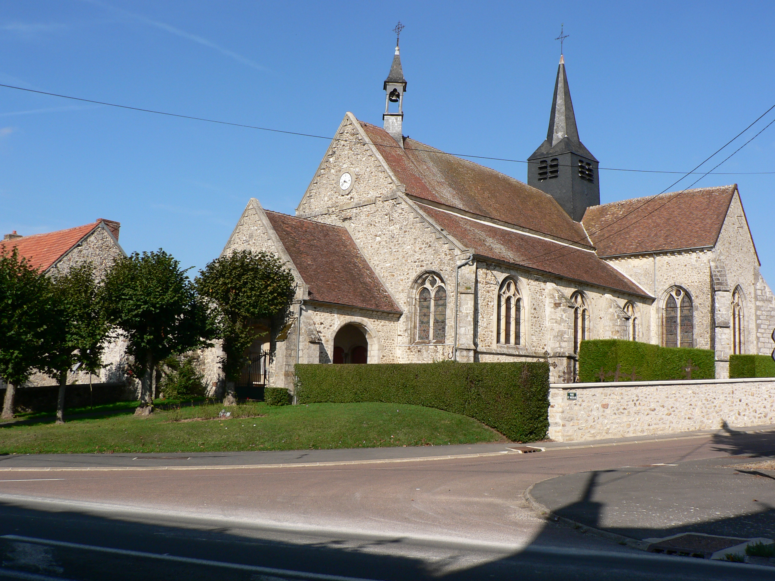 Eglise de la commune